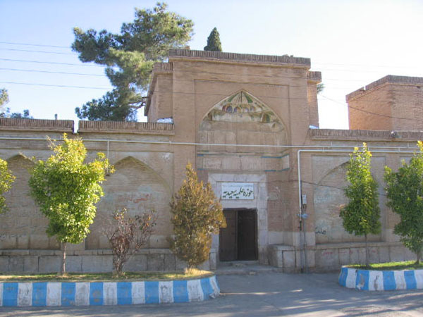 مدرسه سعیدیه ارسنجان مربوط به دوره صفوی است و در ارسنجان ـ کنار خیابان جدیدالاحداث واقع شده و این اثر در تاریخ ۶ دی ۱۳۵۵ با شمارهٔ ثبت ۱۳۲۰ به‌عنوان یکی از آثار ملی ایران به ثبت رسیده است.[۱] این بنا که از سال 1085 ه. ق به جا مانده است، به صورت چهار ايواني است كه در كنار هر ايوان چهار حجره ساخته شده است. براي احداث اين بنا از آجر استفاده شده و حوضي سنگي در وسط حياط مدرسه وجود دارد. محور اصلي بنا شمالي- جنوبي است. مدرسه سعيديه در نزدیکی مسجد جامع شهر قرار دارد.